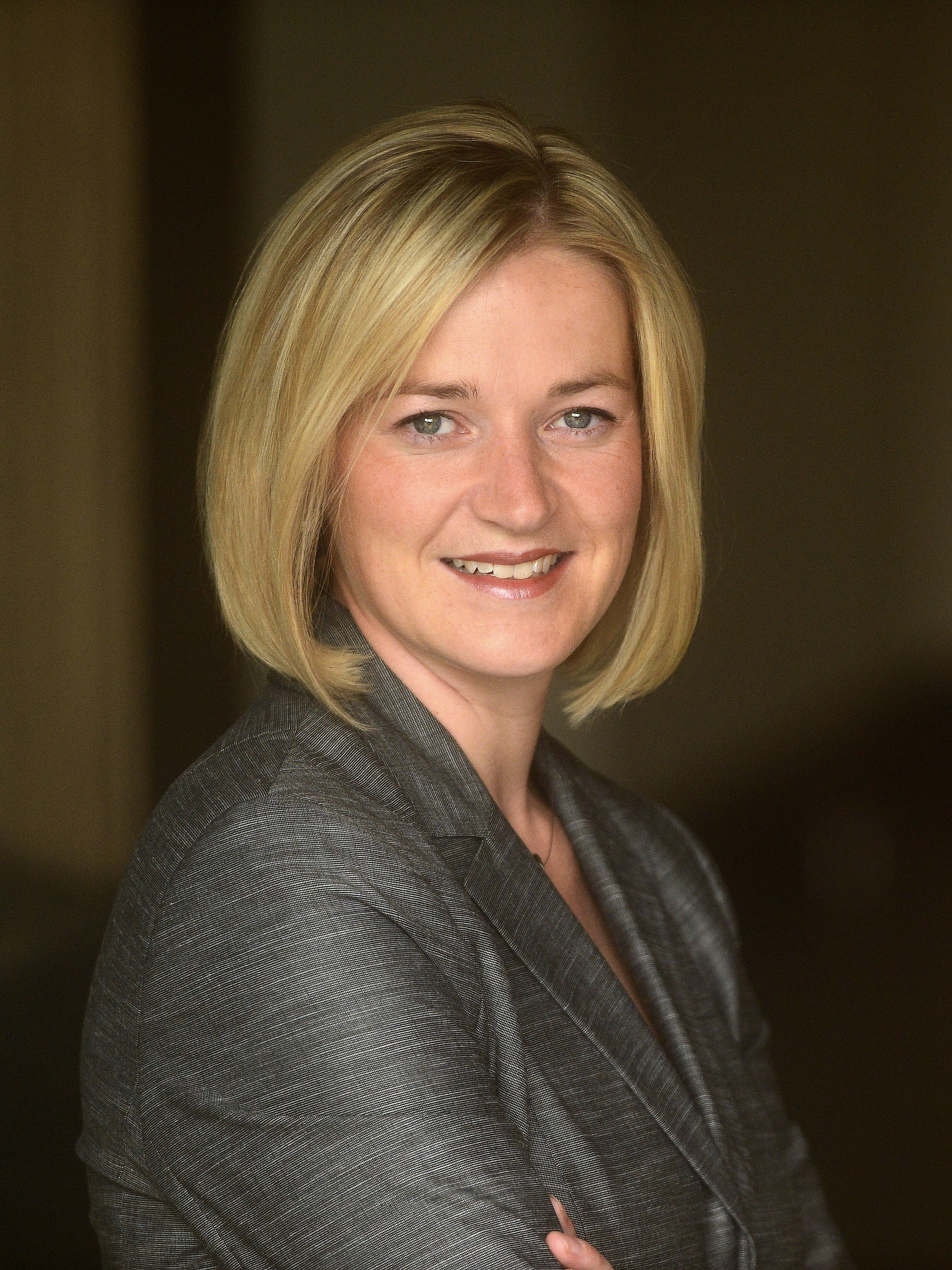 Beate Meißner Landtagsabgeordnete des Thüringer Landtages